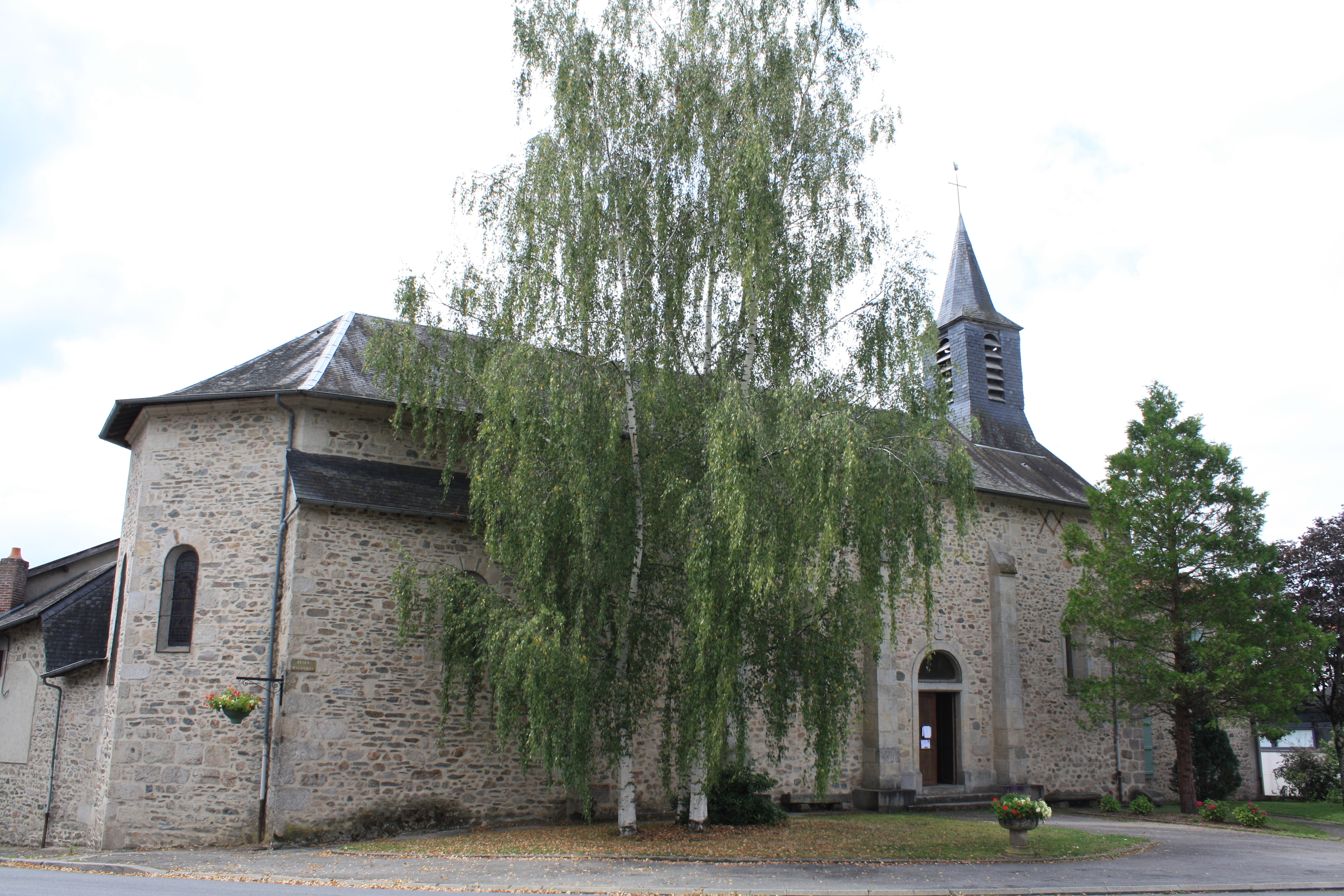 Église de Saint-Brice-sur-Vienne